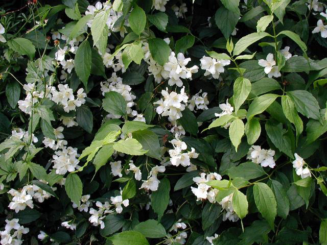 Philadelphus coronarius